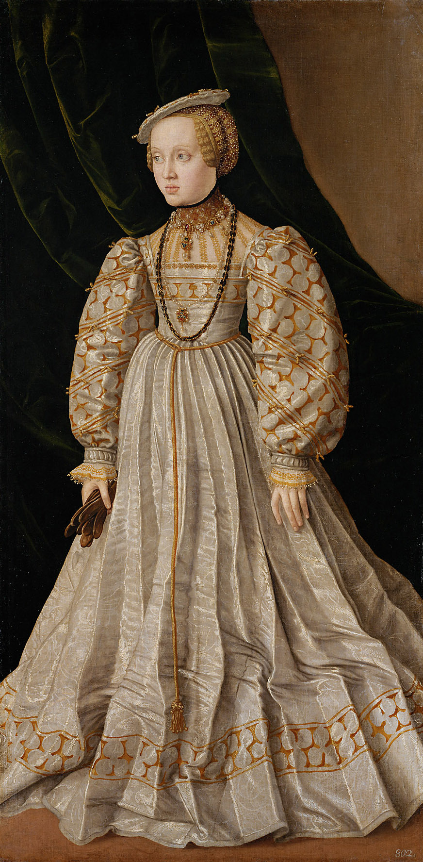 Tochter von Ferdinand I., Bildnis in ganzer Figur